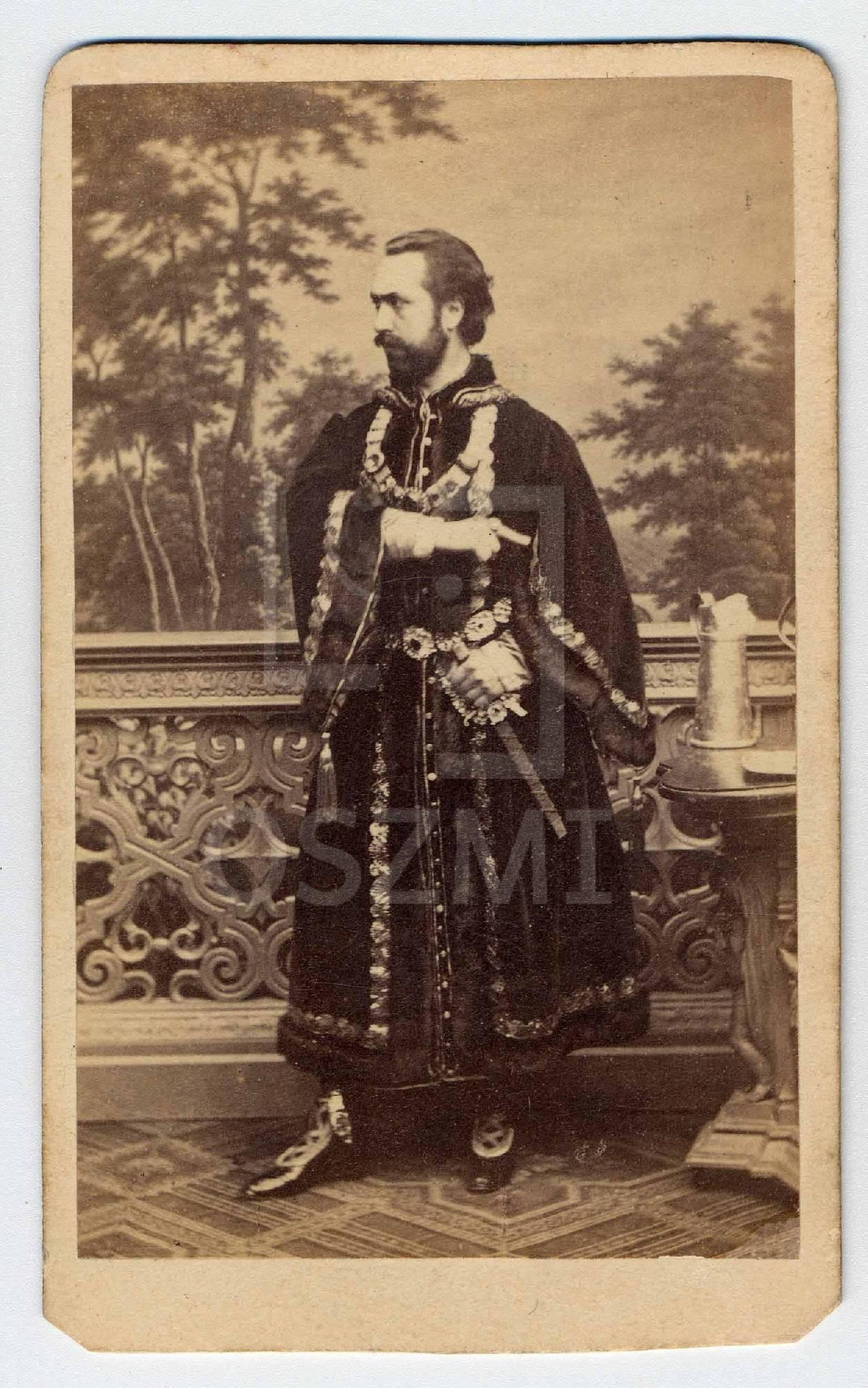 Bignio Lajos mint Bánk az ősbemutatón.